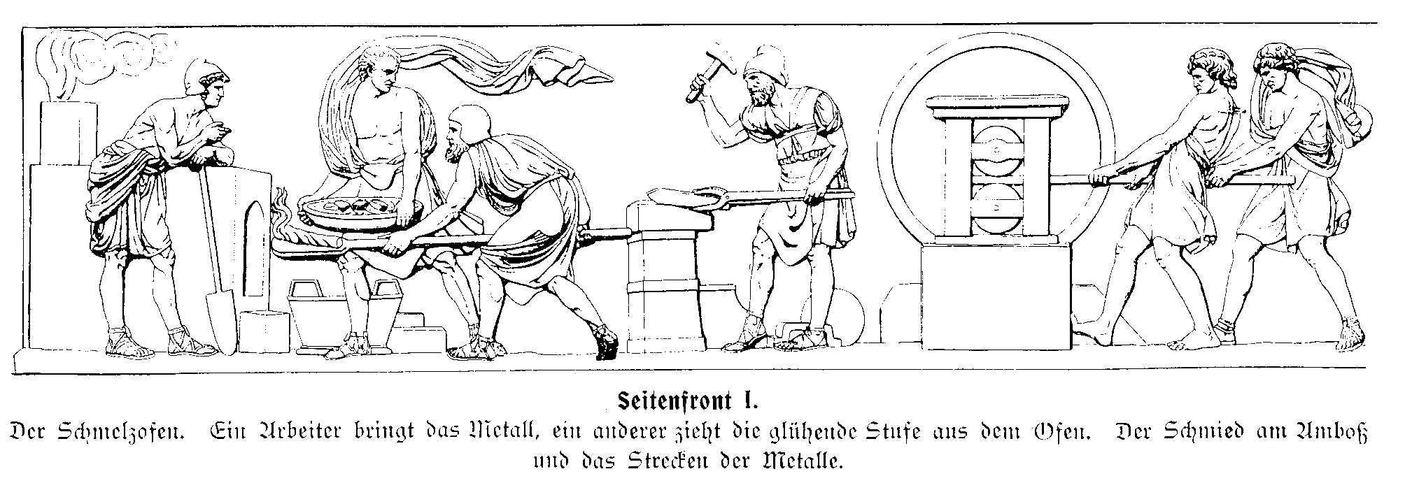 Der Münzfries von Johann Gottfried Schadow, Teil 3.